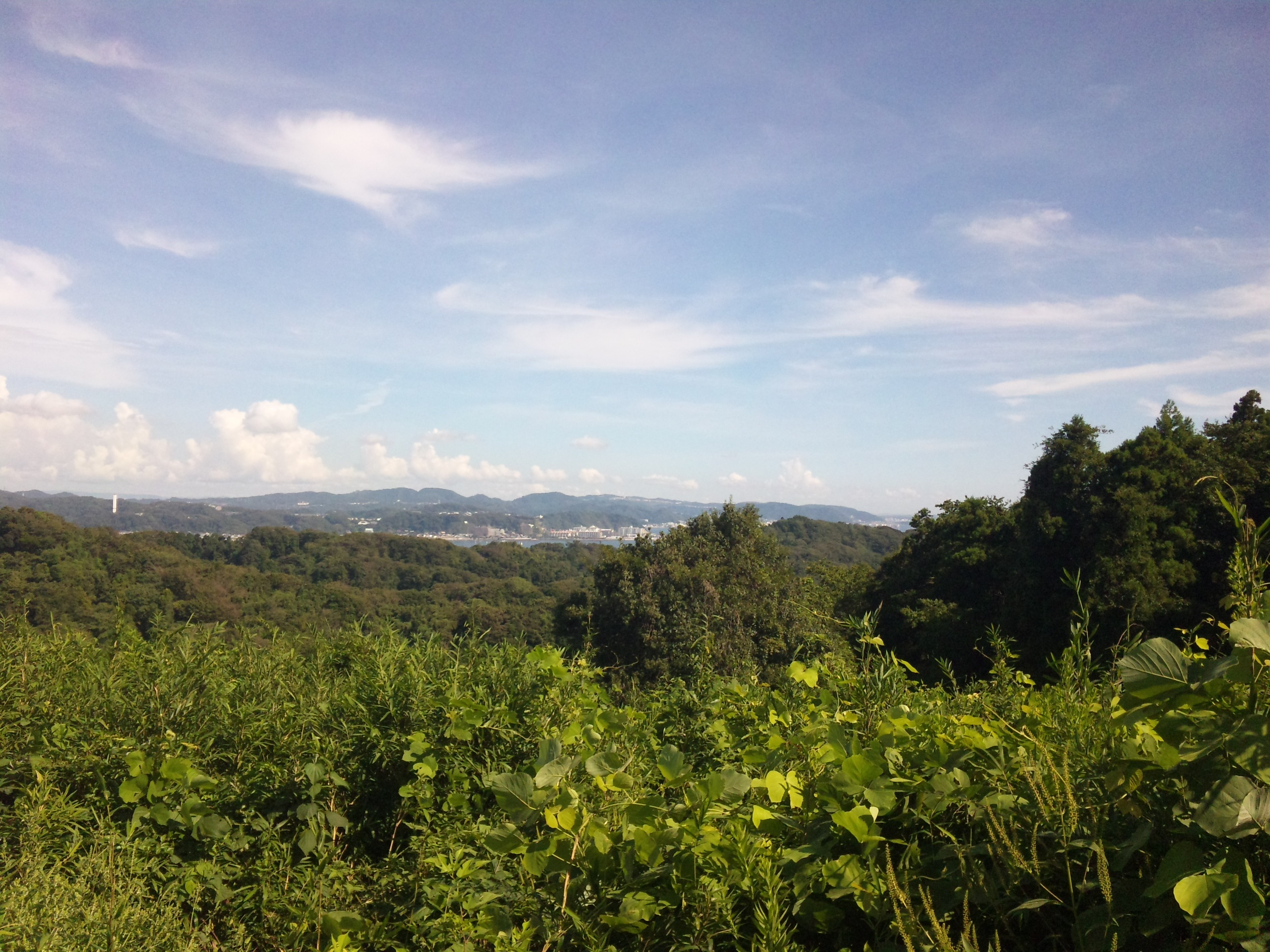 鎌倉山山頂付近